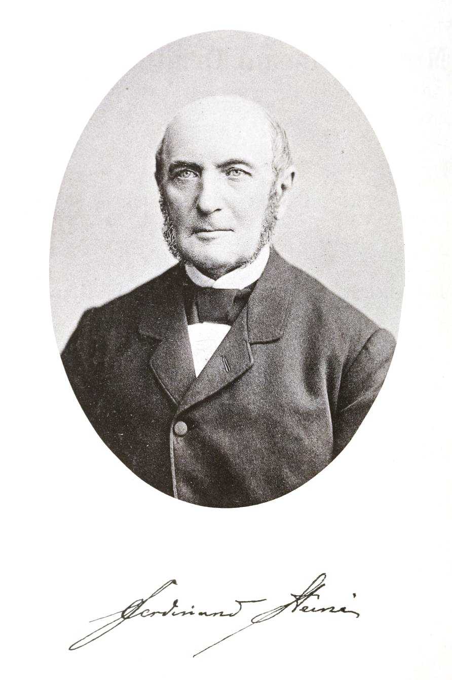 Ferdinand Heine (1809–1894) German ornithologist